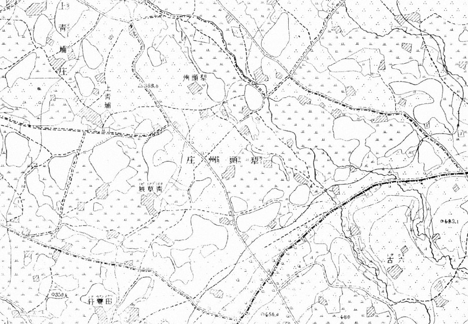 臺灣堡圖－桃園市新屋區頭洲周圍截圖